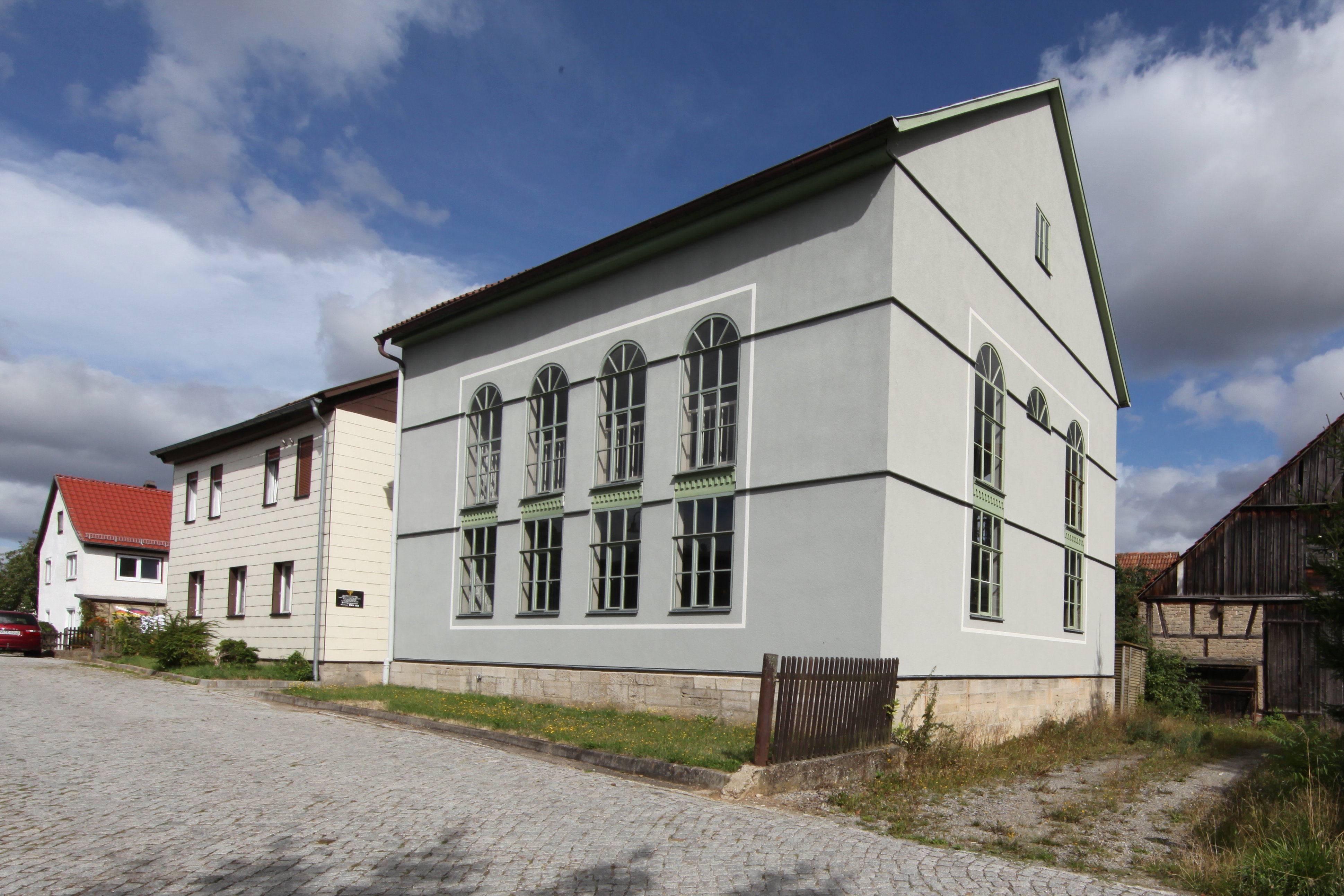 Berkach, Synagoge, daneben das einstige jüdische Schulgebäude